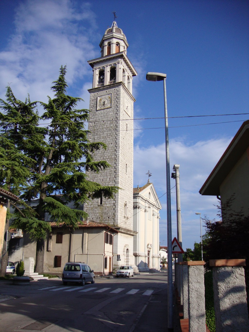 San Pier d'Isonzo: la chiesa parrocchiale di San Pietro.